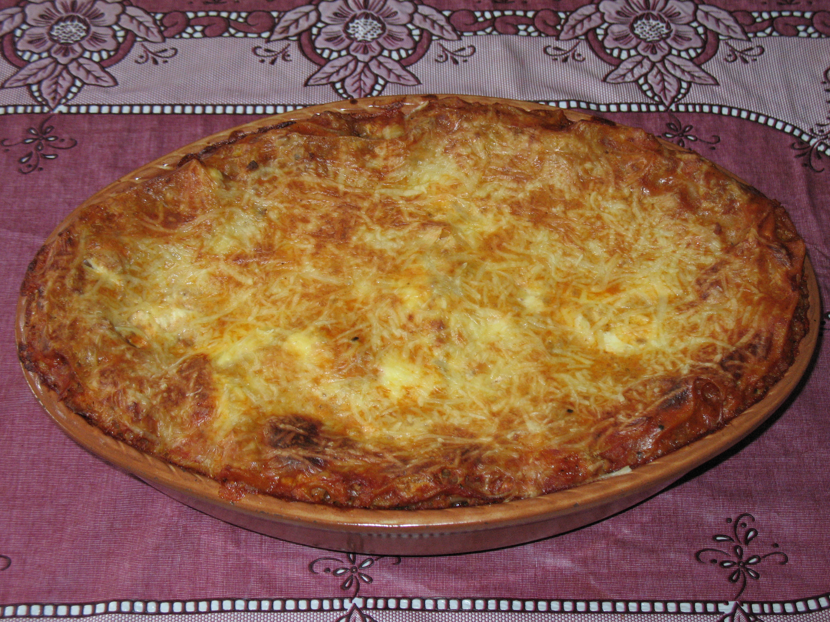 Lasagna (Lasagne)